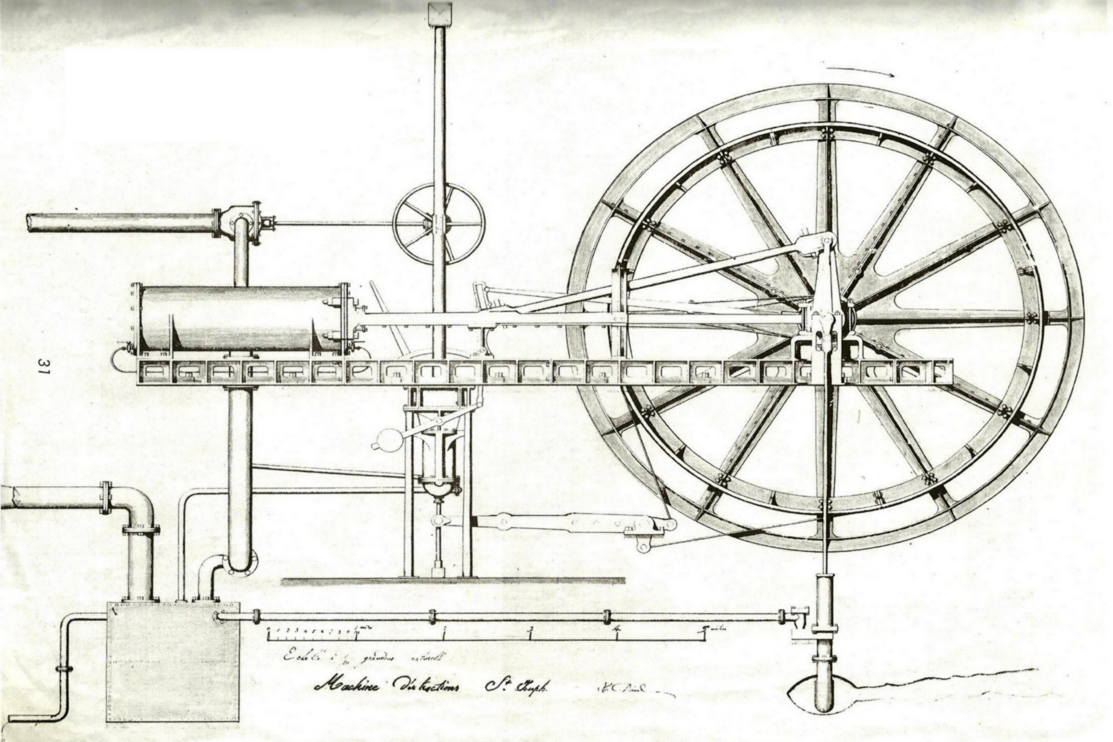 Plan ancien de la machine d'extraction à vapeur du puits Saint-Joseph (milieu du XIXème siècle).